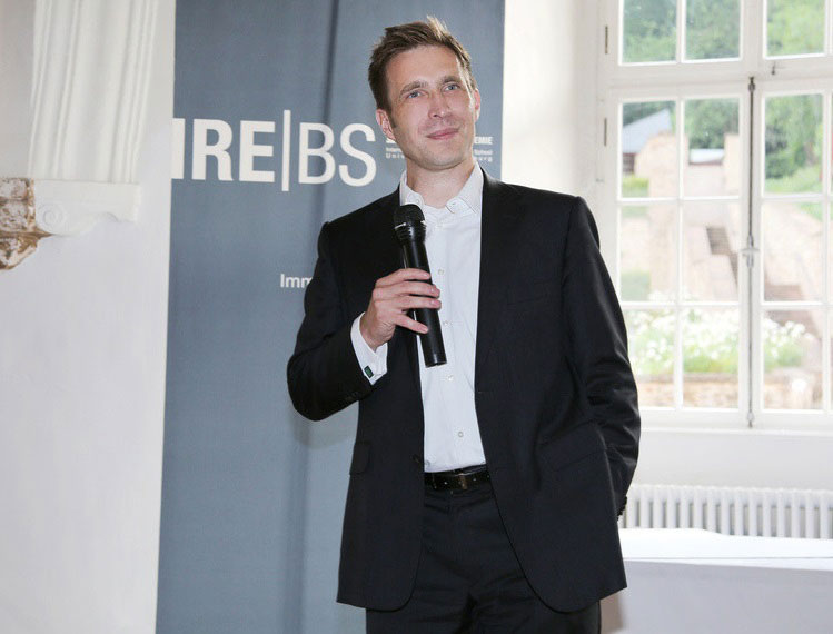 Prof. Dr. Tobias Just bei der Zeugnisverleihung der IREBS Immobilienakademie im Juli 2015 im Kloster Eberbach in Eltville.